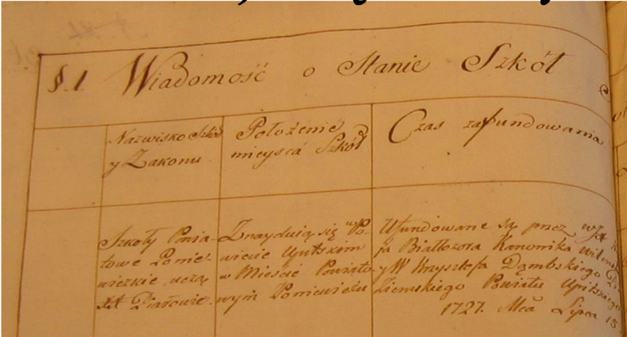 Dokumentas, liudijantis apie pijorų vienuolių įkuriamą mokyklą Panevėžyje 1727 m. liepos 15 d. Mokykla buvo keturklasė, joje dirbo 4 mokytojai, mokėsi 108 mokiniai.